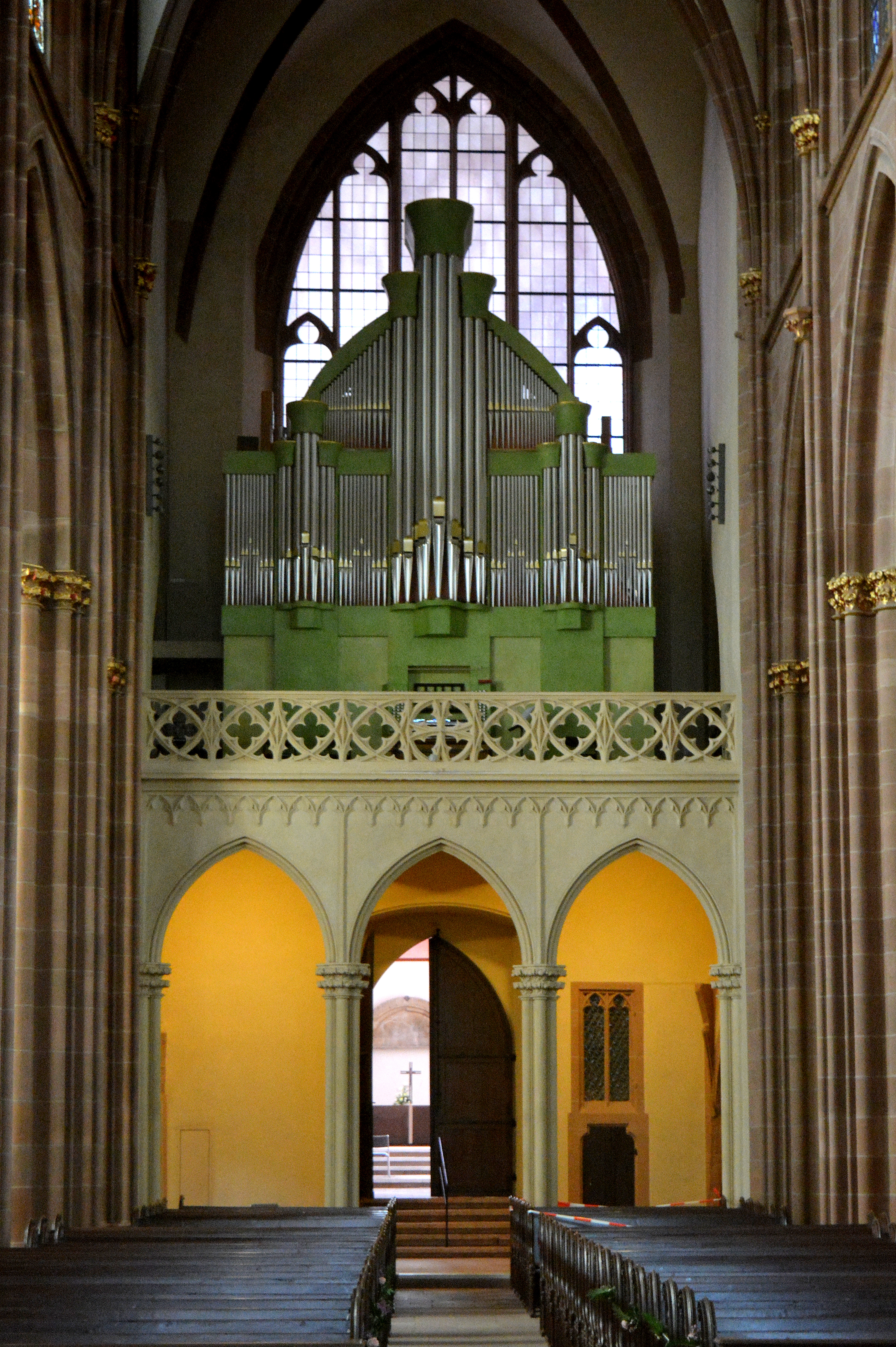 Katarinatsjerke, Oppenheim, haadoargel